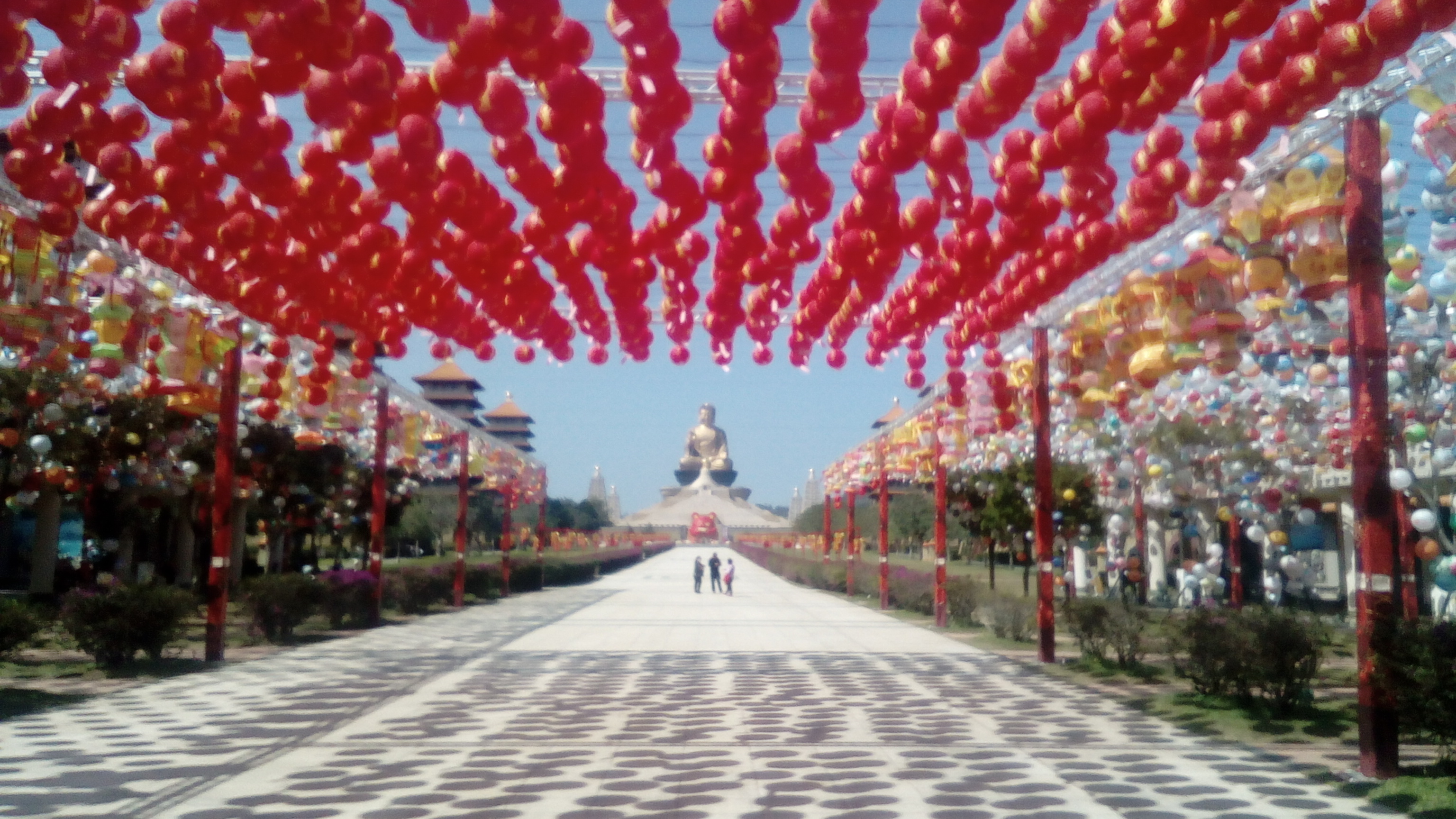 庭院